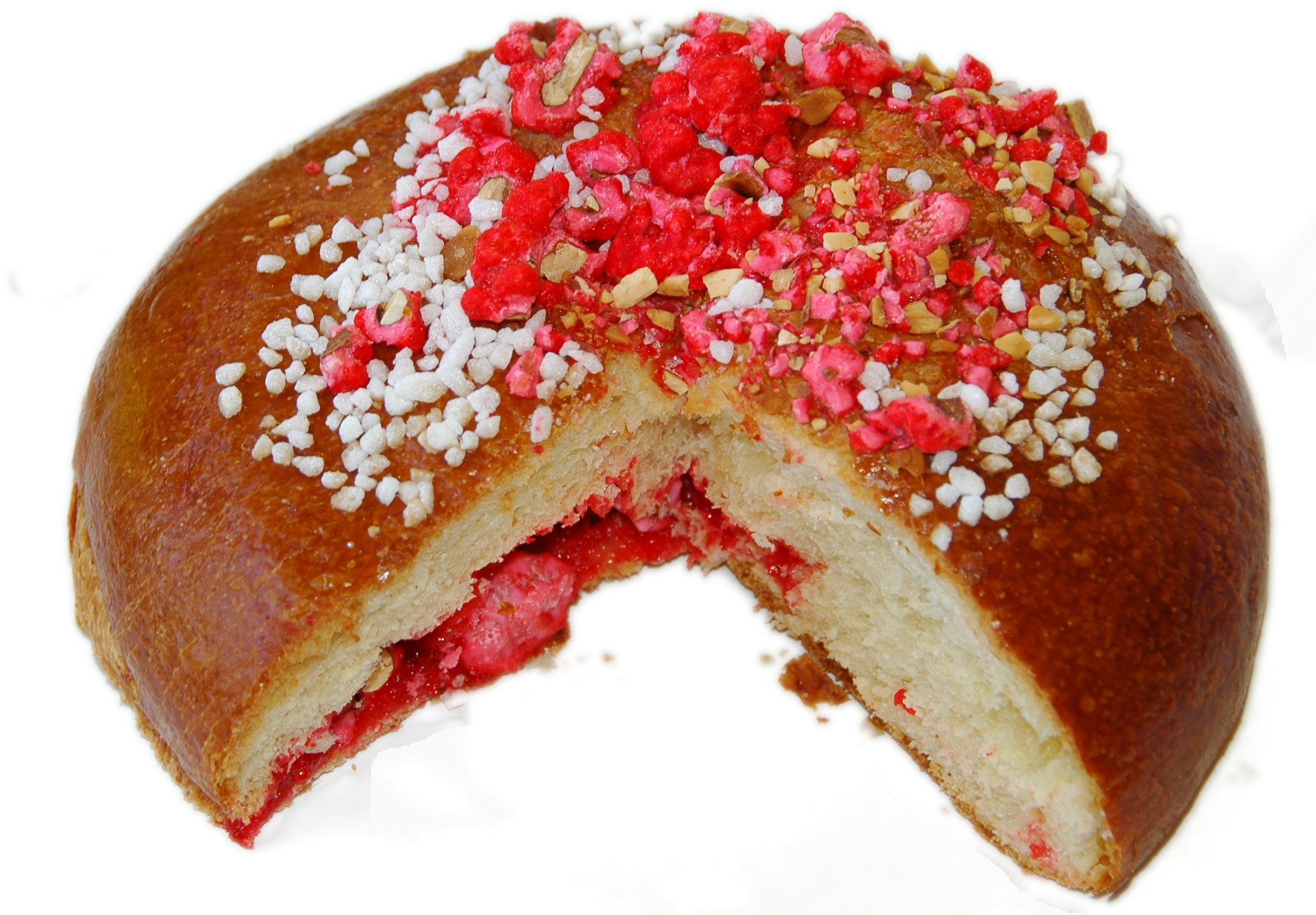 Un « Saint Genix ». Cliché perso, pris avant destruction gastro-entérique de l'objet. Considérant la créativité de l'œuvre : Bon appétit !